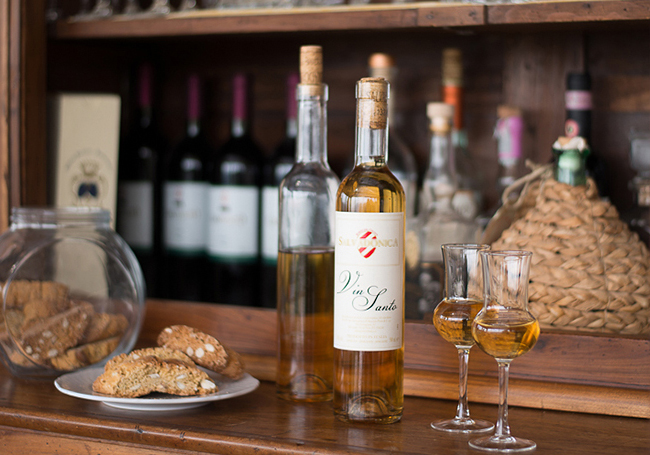 Cantucci con Vin Santo, Toscana - Italia